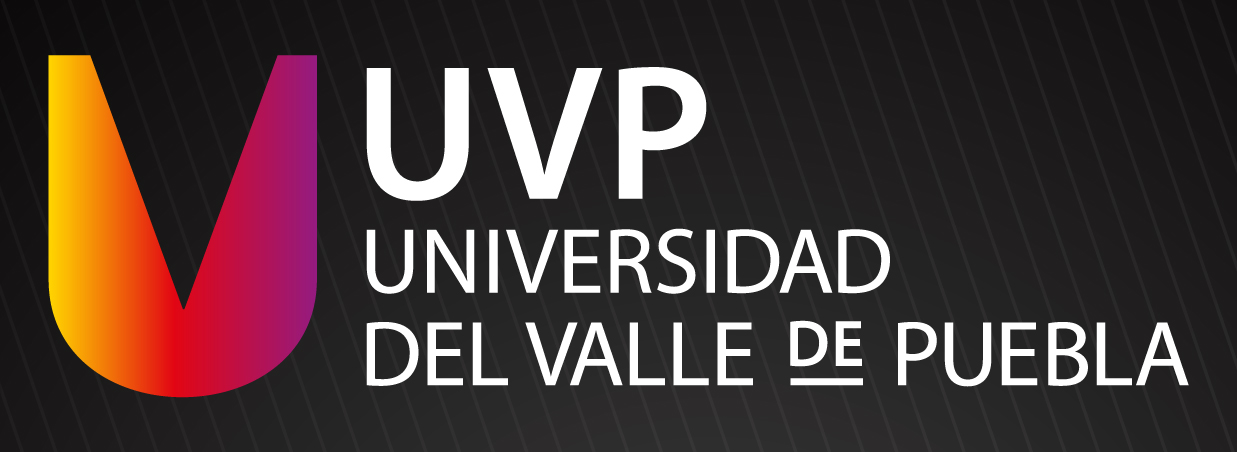 Logotipo de la Universidad del Valle de Puebla